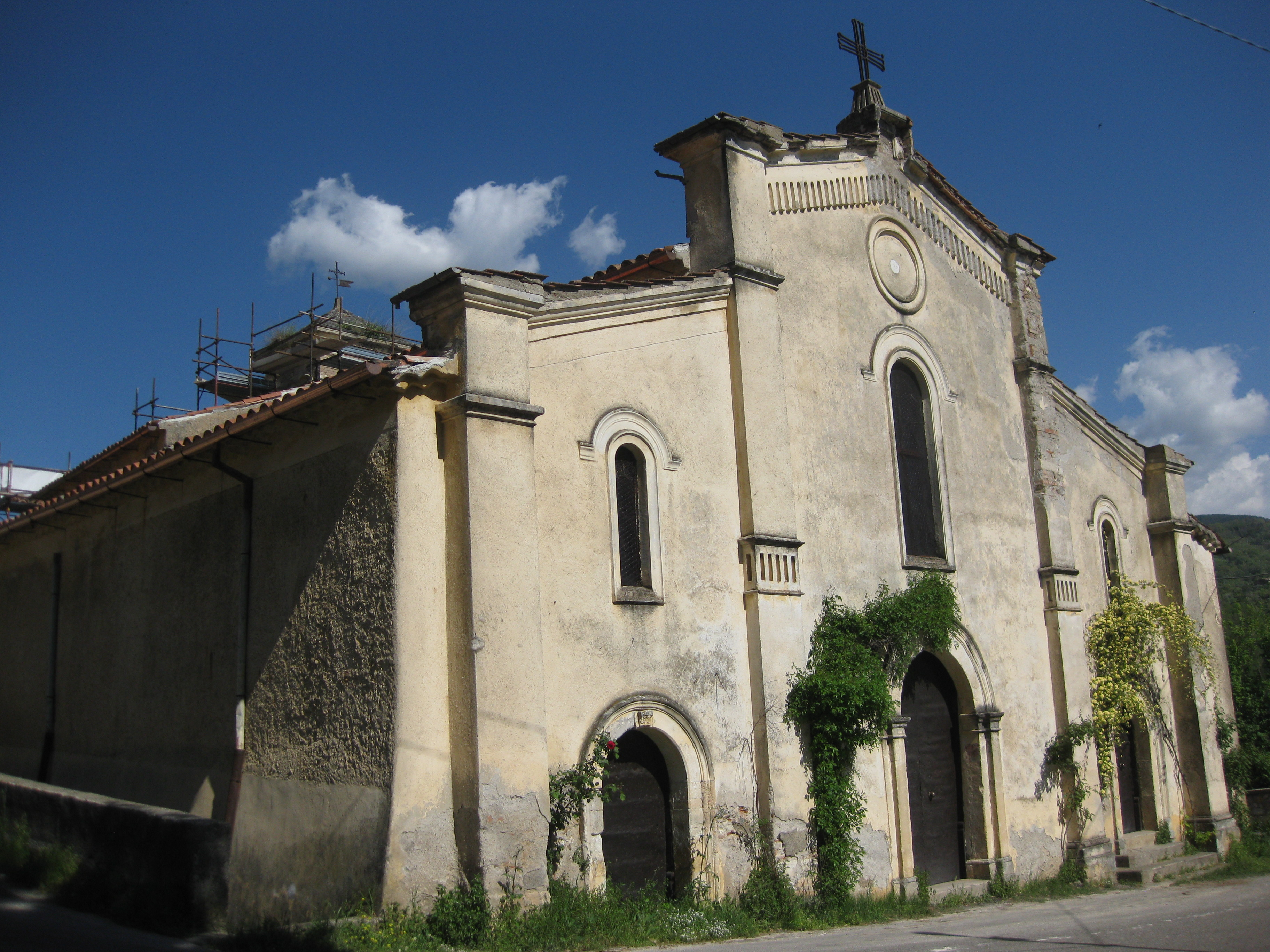 Chiesa di Santa Maria Assunta, Perito, Pedace